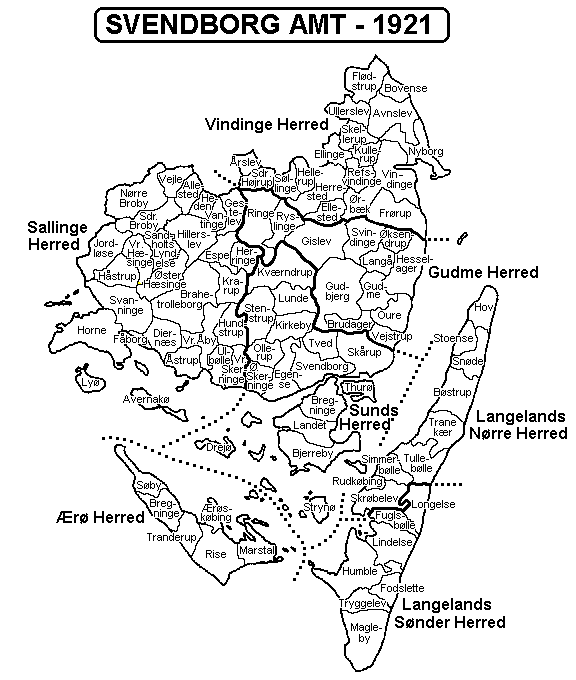 Map of Svendborg Amt 1921, Denmark. Map by Svend-Erik Christiansen.